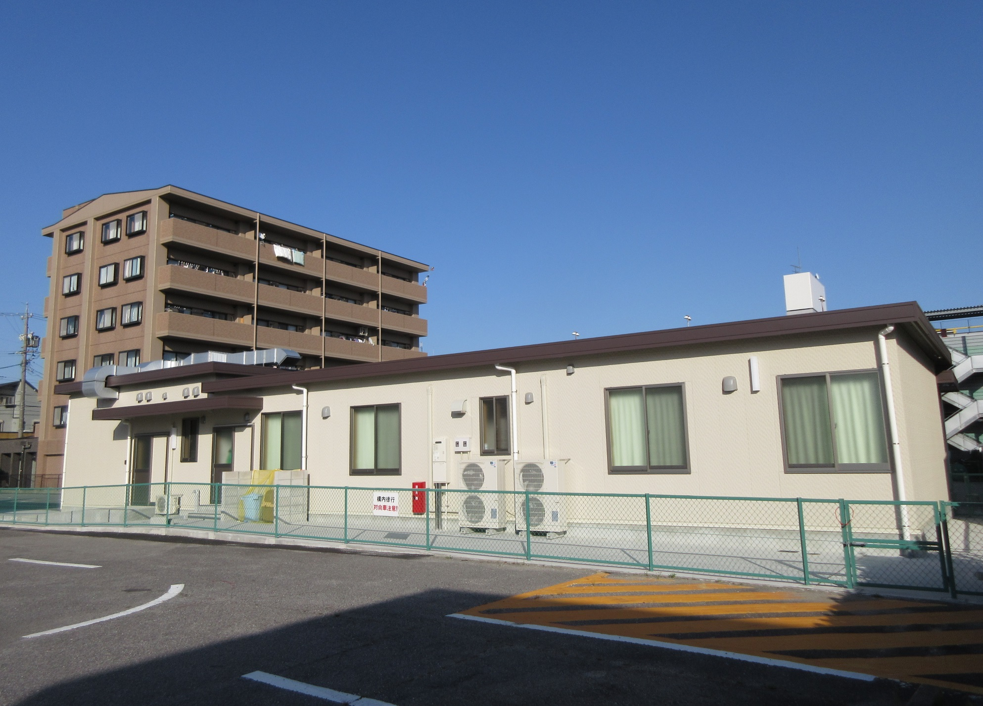 岡崎市南部乳児保育園（岡崎市羽根西新町）